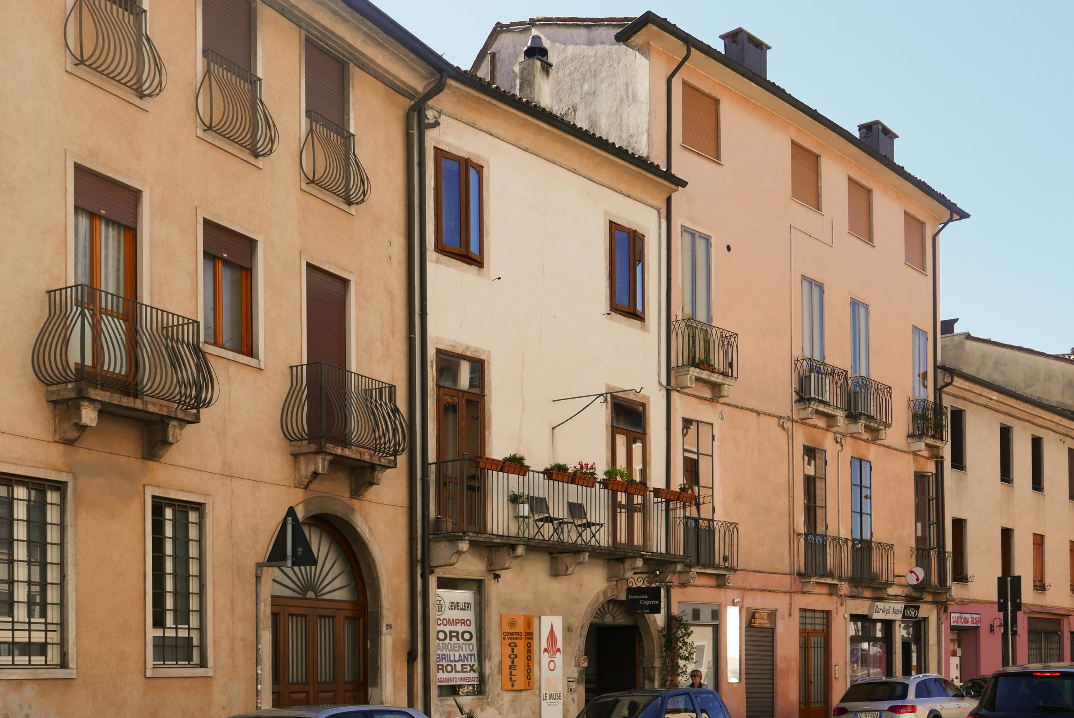 Via IV Novembre-1